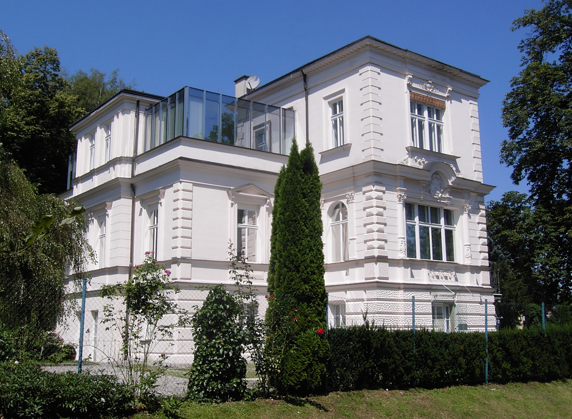 Steyr Preuenhueberstraße 5, 7, Villa Berger mit Portiershaus, südwestliche Fassadenansichten